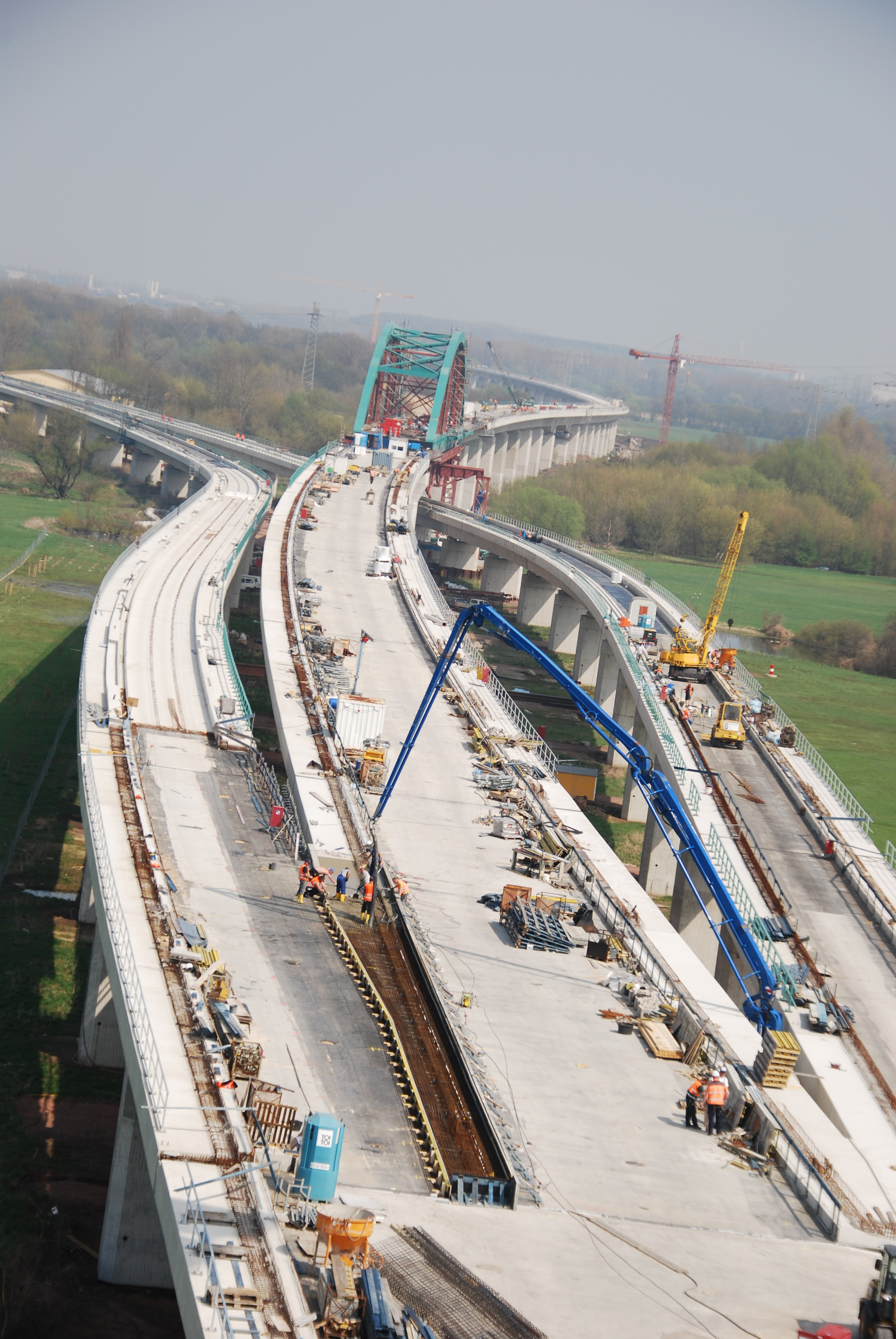 Saale-Elster-Talbrücke Kreuzungbauwerk Höhe Planena;Betonage Kappe Haupstrecke